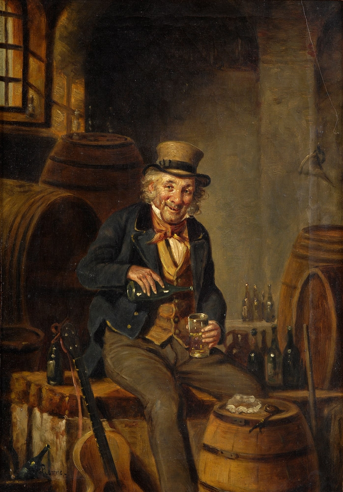 Am richtigen Fleck. Signiert. Öl auf Leinwand, 47 x 31,5 cm